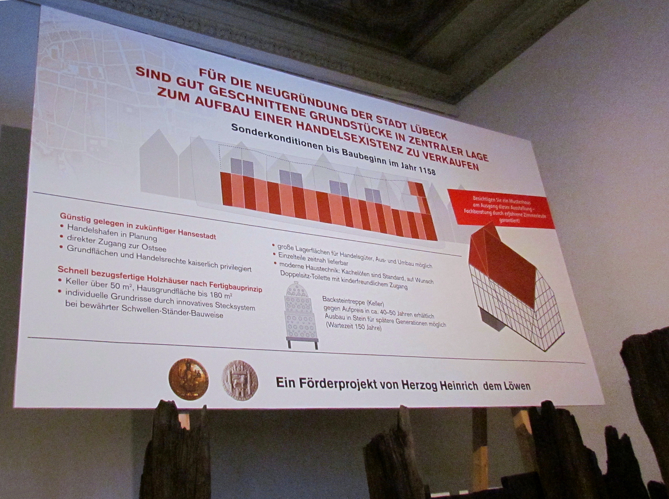 Fiktives Baustellenschild für Bauten in Lübeck ab 1158 in der Ausstellung "Bewegte Zeiten. Archäologie in Deutschland" in Berlin